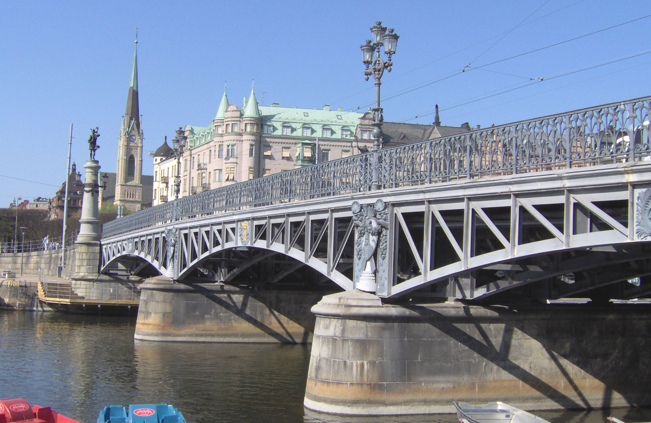 Djurgårdsbron med Oscarskyrkan i bakgrunden, Stockholm, Sweden.